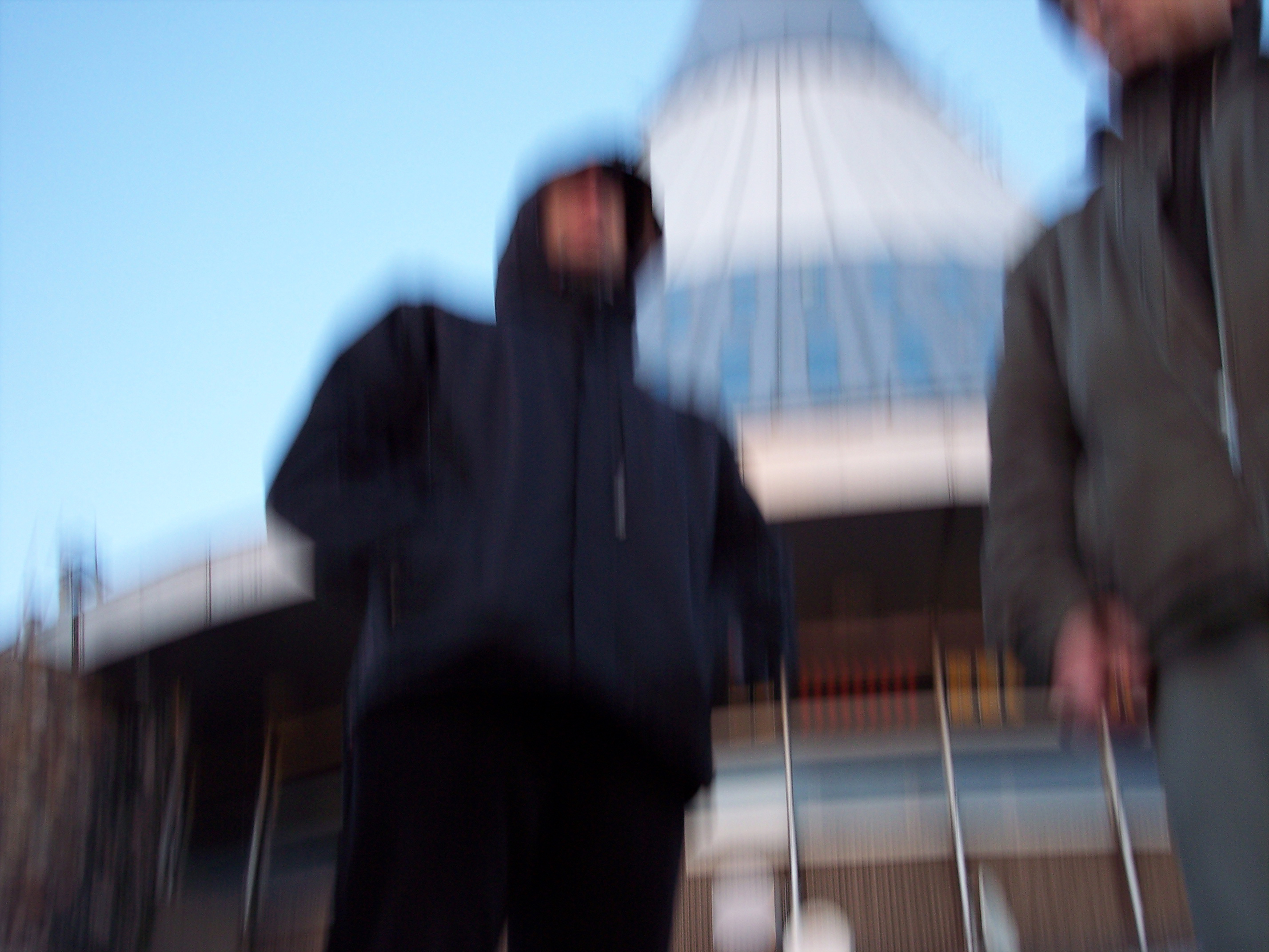 Kora et le Mechanix. Michal Kořán. Filip Homola. Liberec.